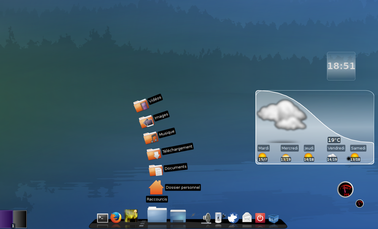 Dock Cairo-Dock : exemple de rendu